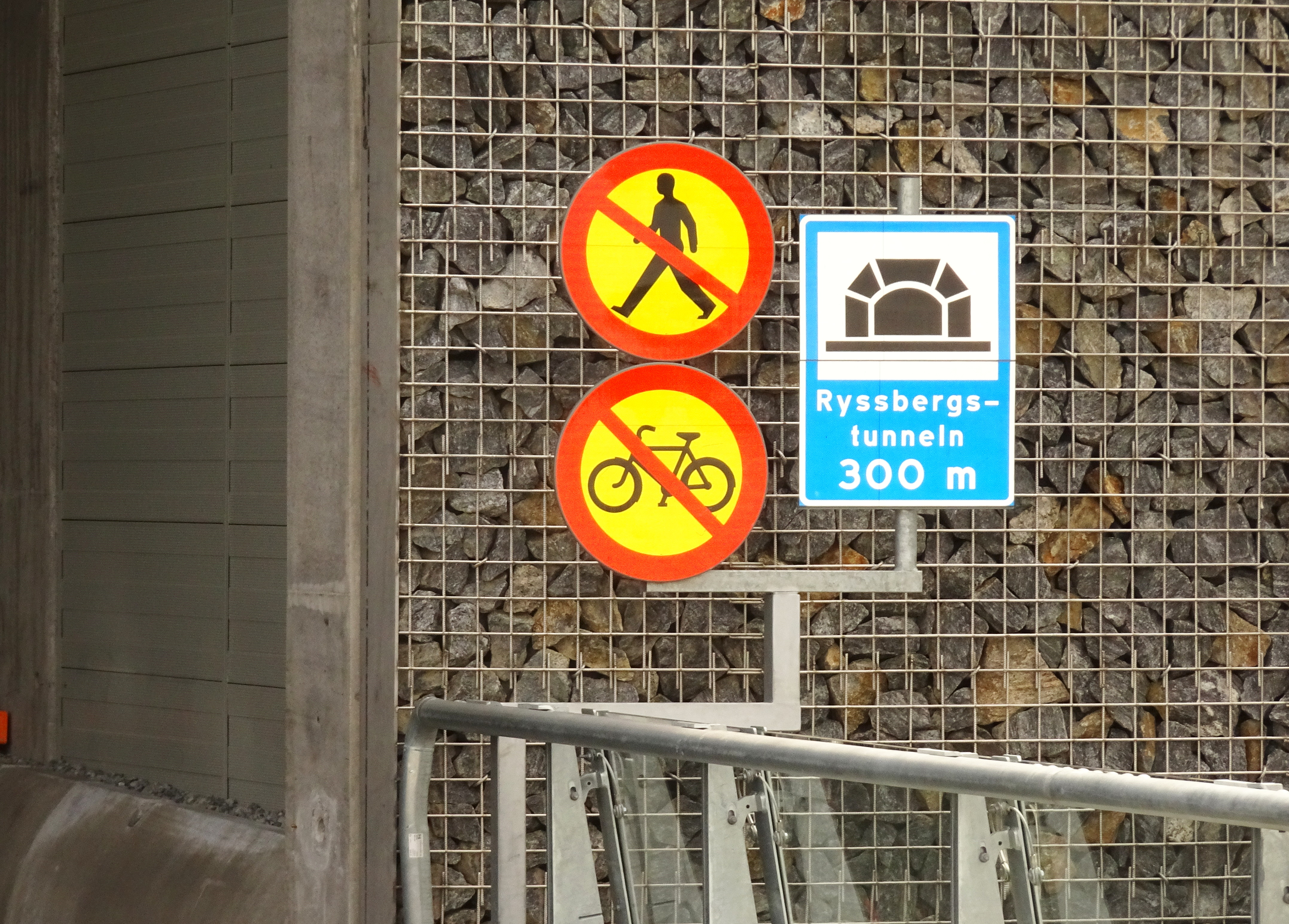 Ryssbergstunneln